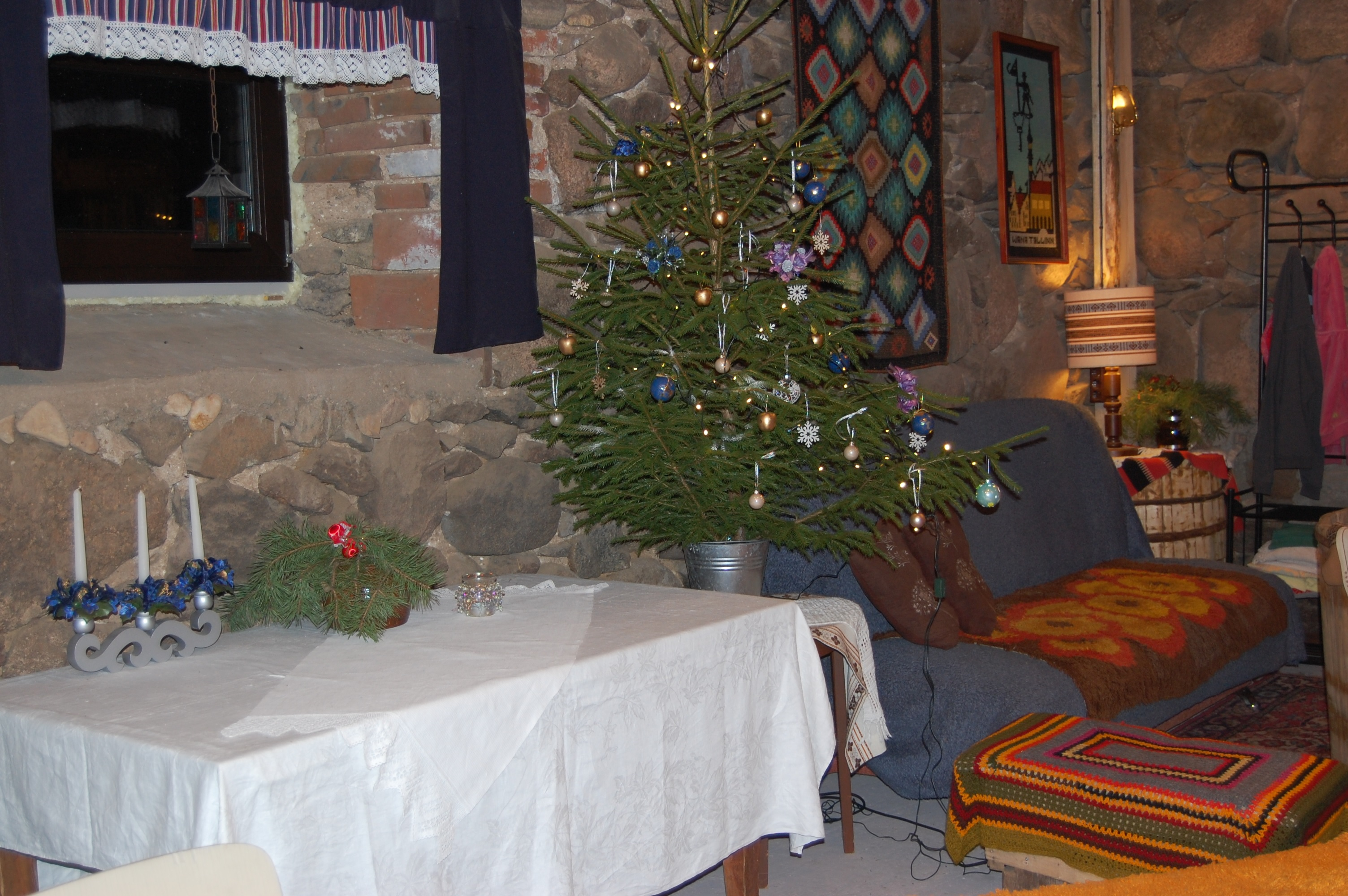 Alle-Saija Teatritalus jõulud